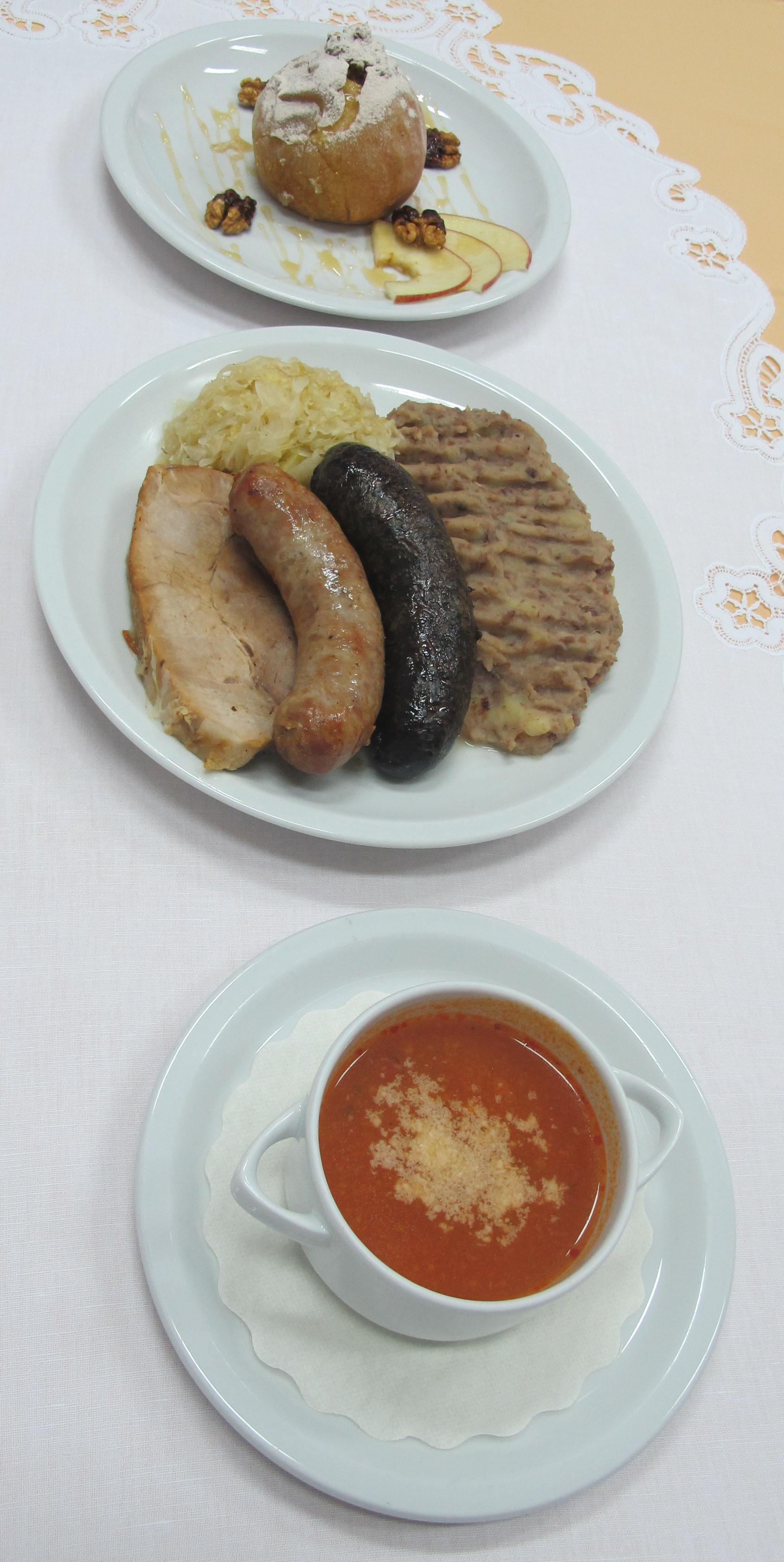 Primorska juha, kmečka pojedina in pečeno jabolko z medom in orehi.